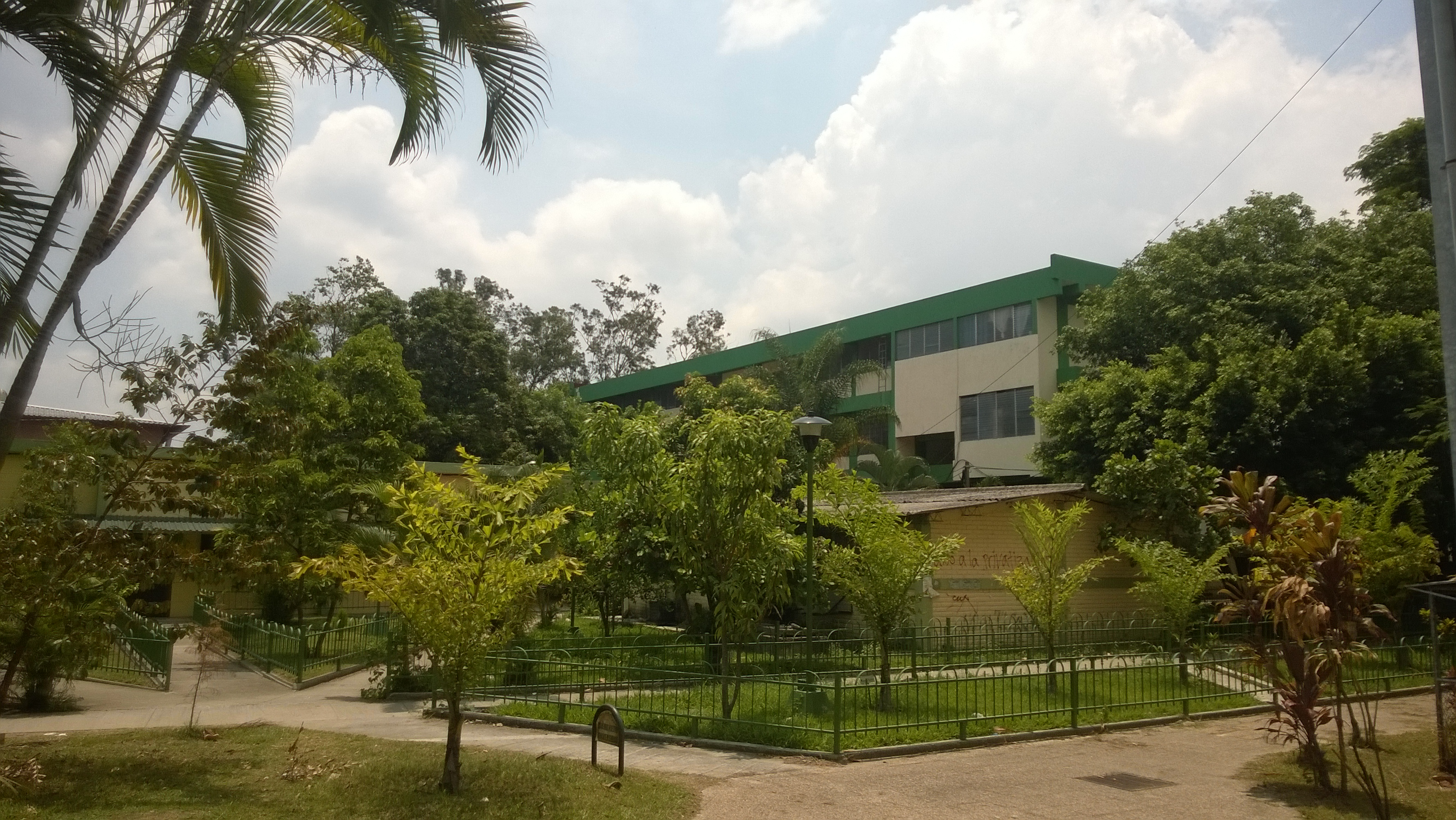 Facultad de Química y Farmacia de la Universidad de El Salvador.